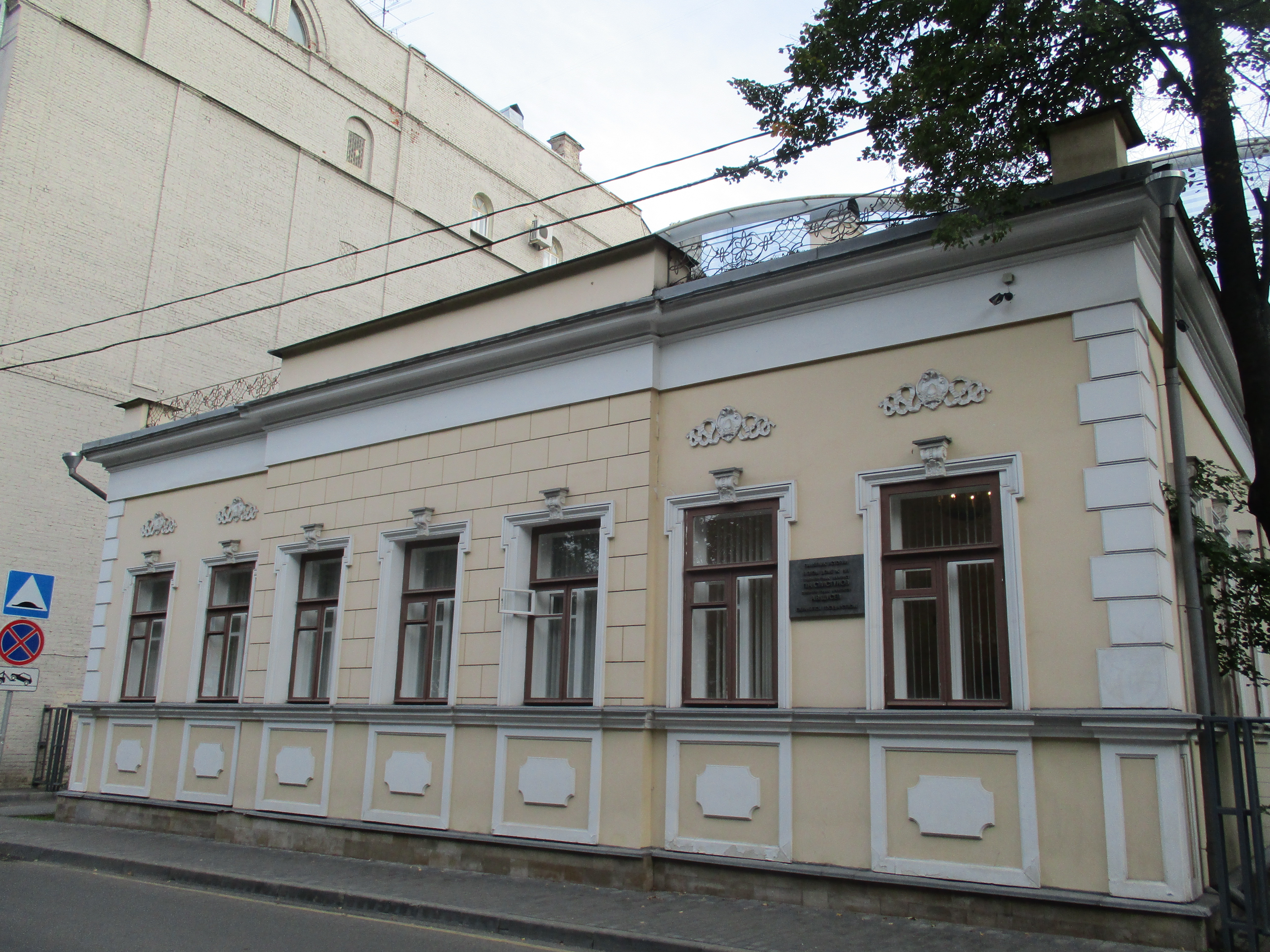 Дом, в котором в 1867-1879 гг. жил Свистунов Петр Николаевич после вовращения из ссылки и в 1912-1947 гг. - Щусев Алексей Викторович: Гагаринский пер., дом 25, Хамовники, Центральный округ, Москва